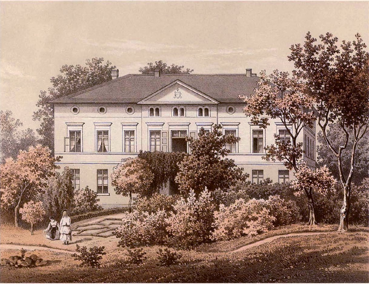 Gut Klein-Werther